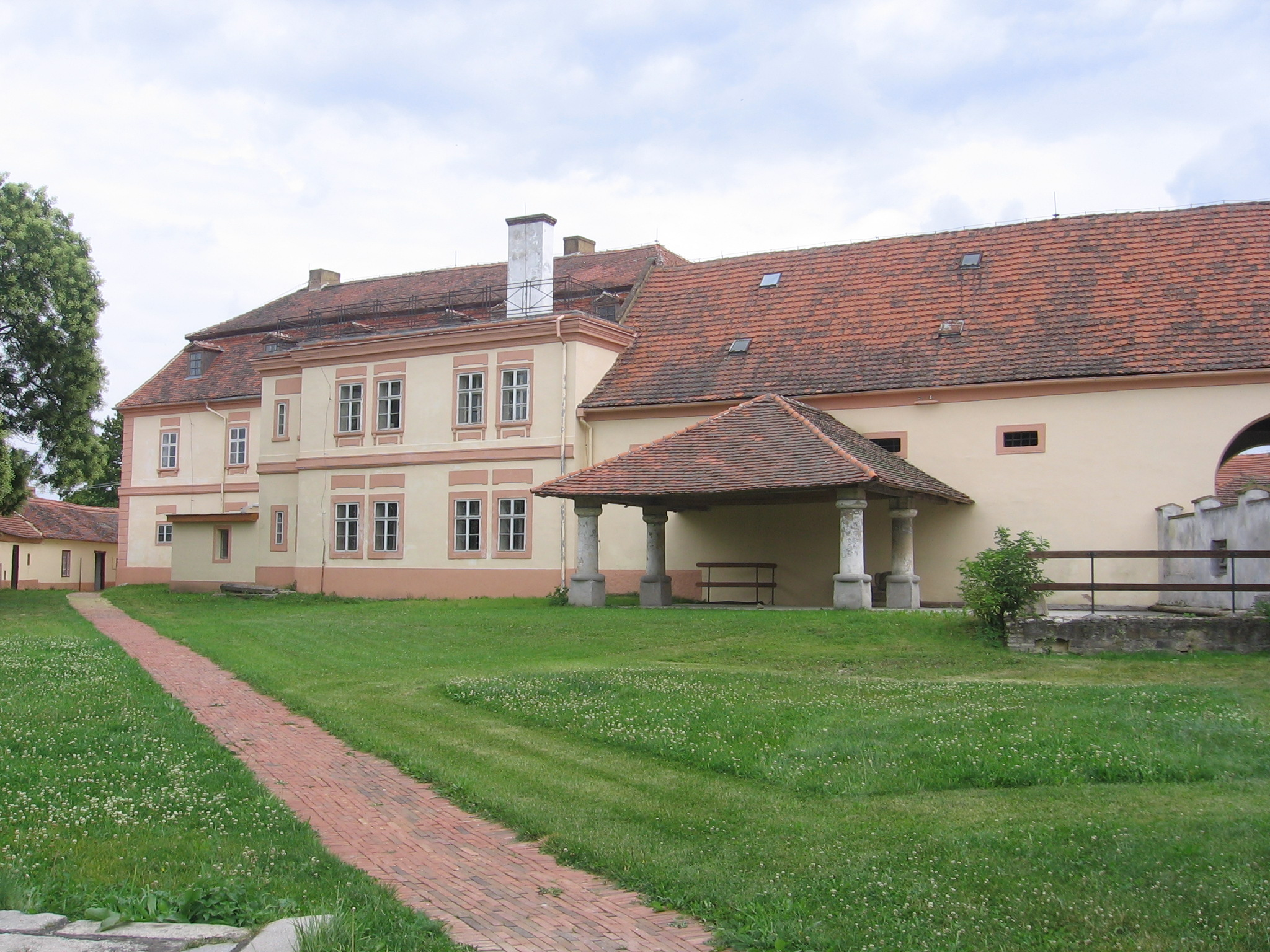 Zámek Újezd nade Mží, Újezd nade Mží 1, okr.Plzeň-sever